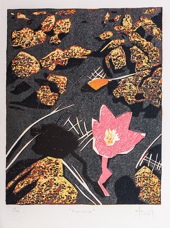 Fotografia de Xilogravura da artista Hannah Brandt